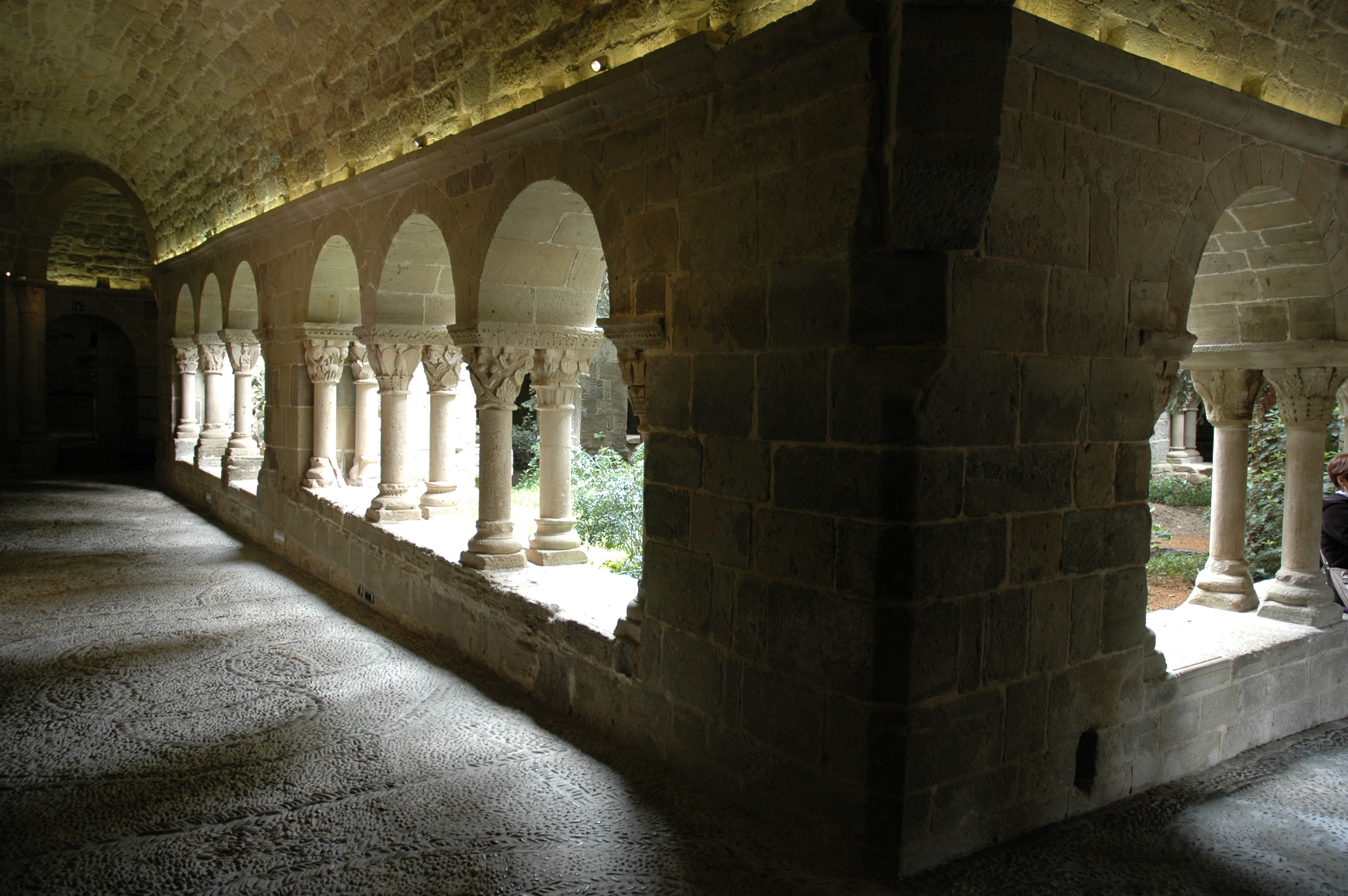 Sant Benet de Bages - Claustre